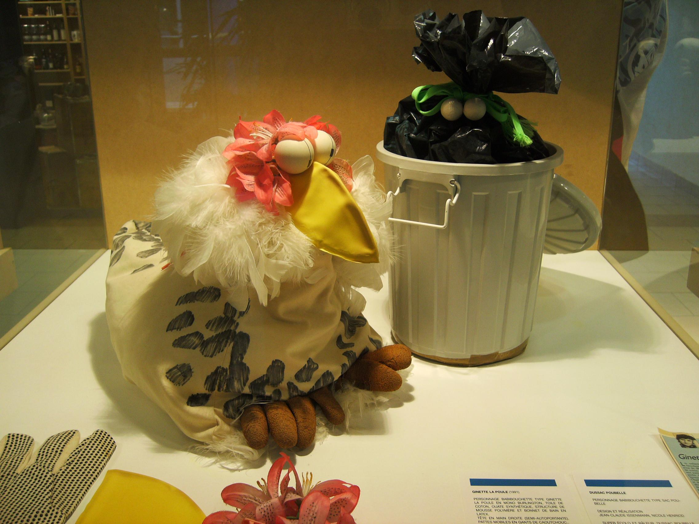 Marionnettes de Ginette la Poule et Dussac Poubelle, ancienne émission de la Télévision suisse romande, les Babibouchettes. Prise de la photo pendant l'exposition des Babibouchettes en juin 2007 au centre commercial de Marin-Epagnier (NE, Suisse).